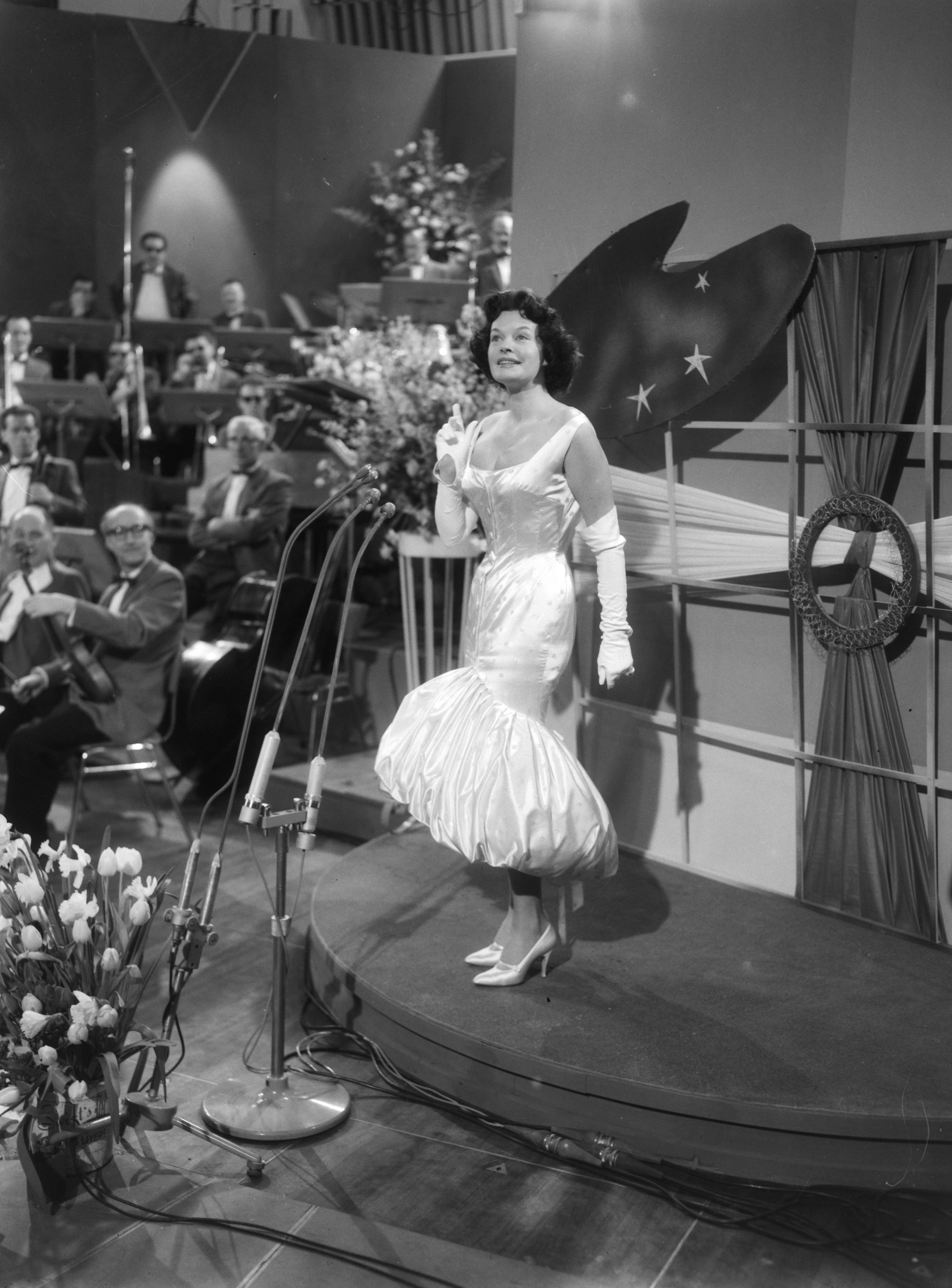 Collectie / Archief : Fotocollectie Anefo Reportage / Serie : Songfestival 1958 Beschrijving : Deelneemster Margot Hielscher (Duitsland) Datum : 11 maart 1958 Locatie : Hilversum, Noord-Holland Trefwoorden : songfestivals, zangeressen Persoonsnaam : Hielscher, Margot Fotograaf : Pot, Harry / Anefo Auteursrechthebbende : Nationaal Archief Materiaalsoort : Negatief (zwart/wit) Nummer archiefinventaris : bekijk toegang 2.24.01.04 Bestanddeelnummer : 909-3999